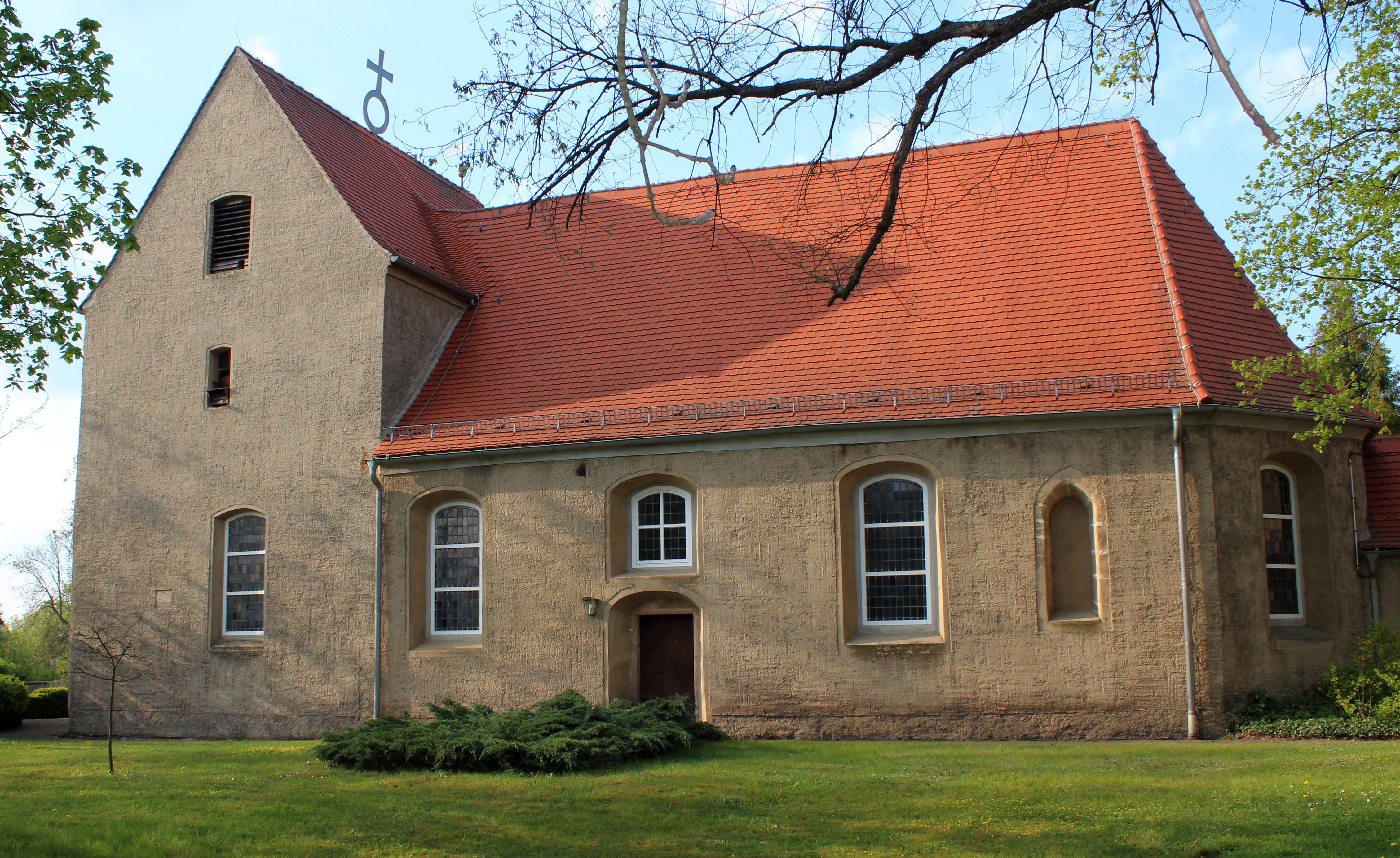 Dorfkirche Würdenhain, Deutschland.